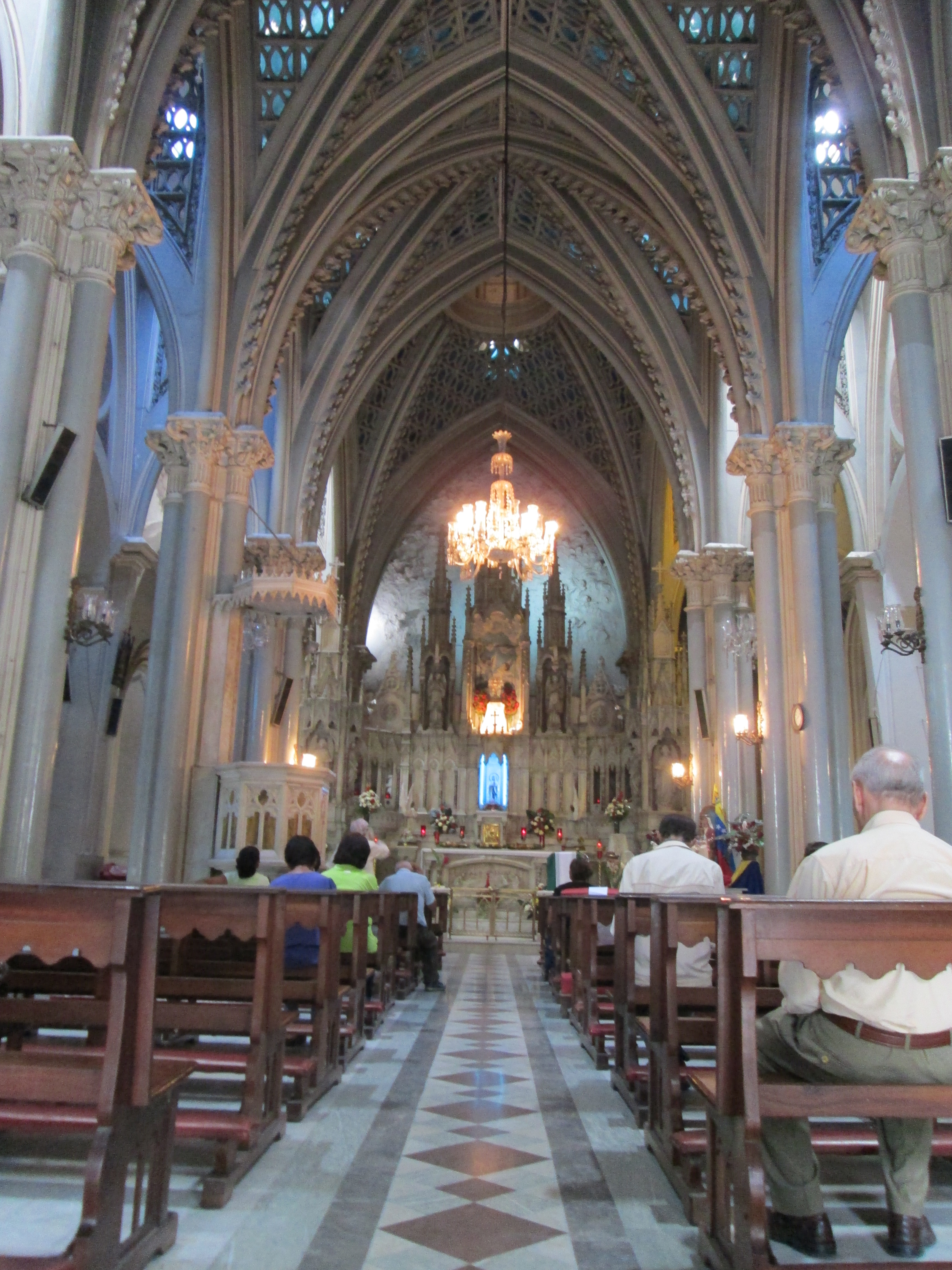 Interior Basílica Menor